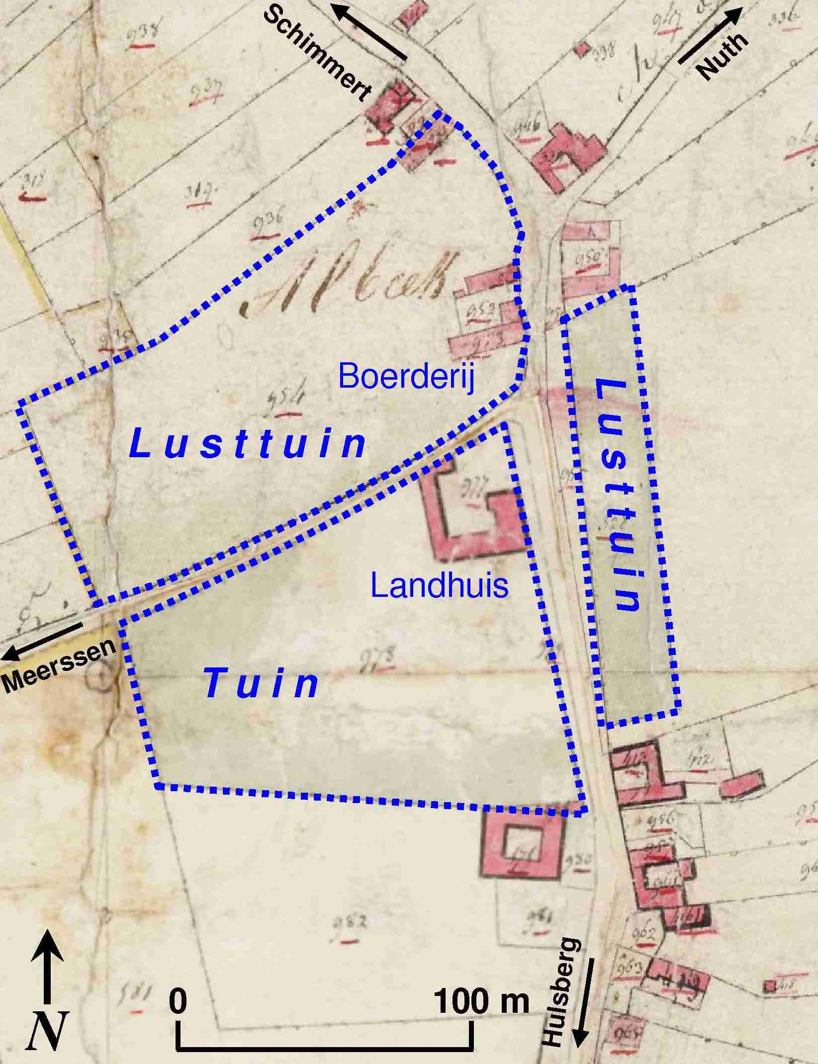 Omvang en onderdelen landgoed Aalbeek in 1840